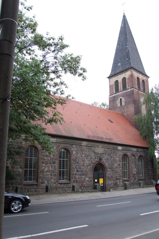 Dorfkirche Berlin-Biesdorf Fotograf: Harald Rossa Datum: August 2006 Höher aufgelöste Version ist verfügbar